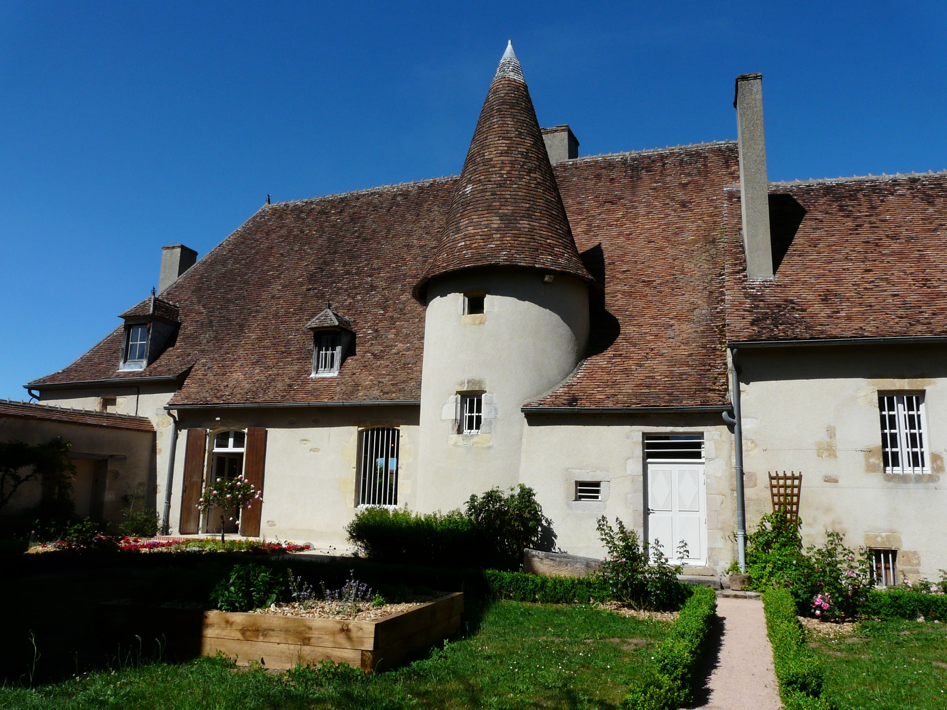 Extérieur du musée Emile Chénon